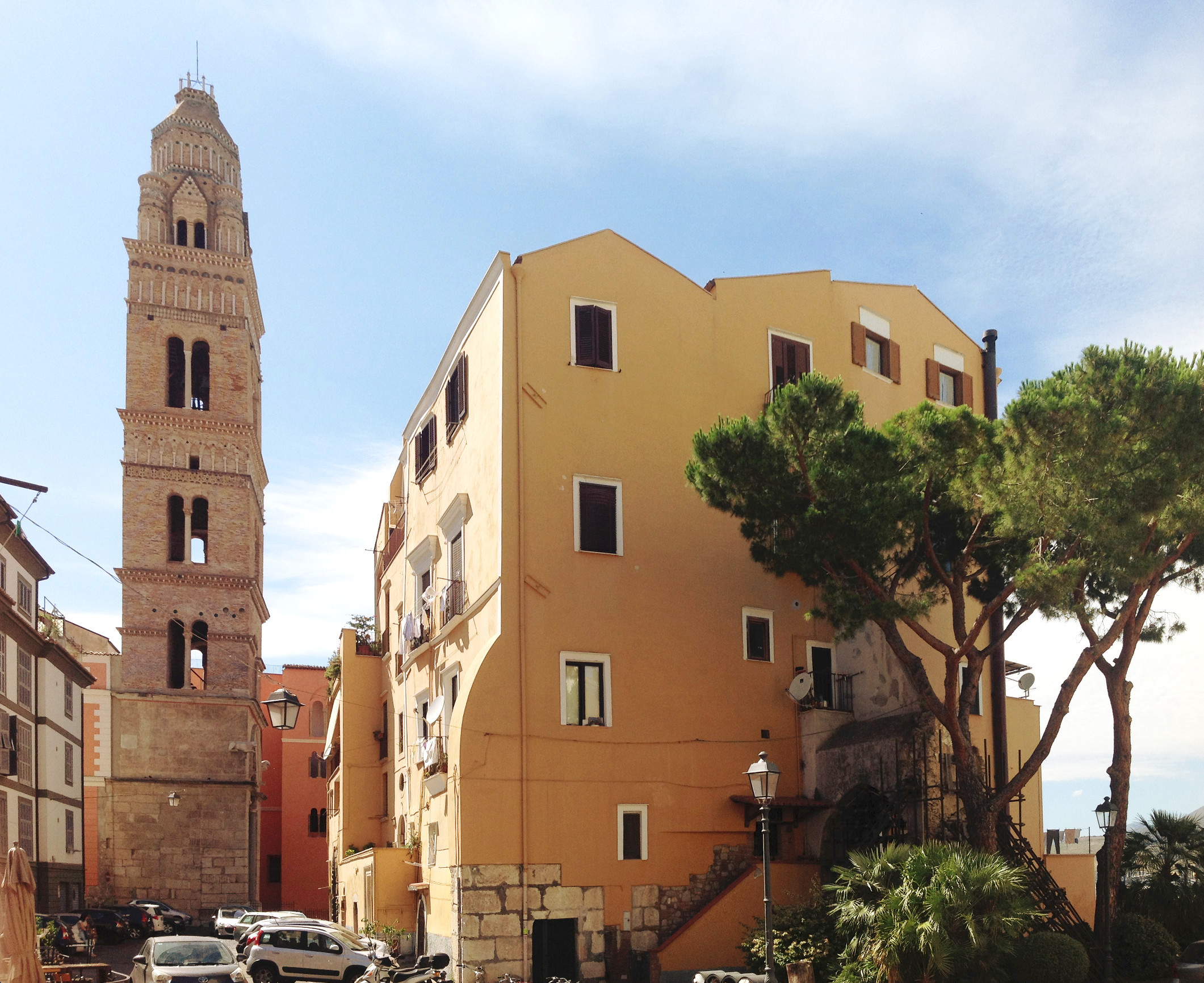 Piazza Cavallo (l'antico foro) con il campanile della cattedrale e, sulla destra, la porta Domnica.